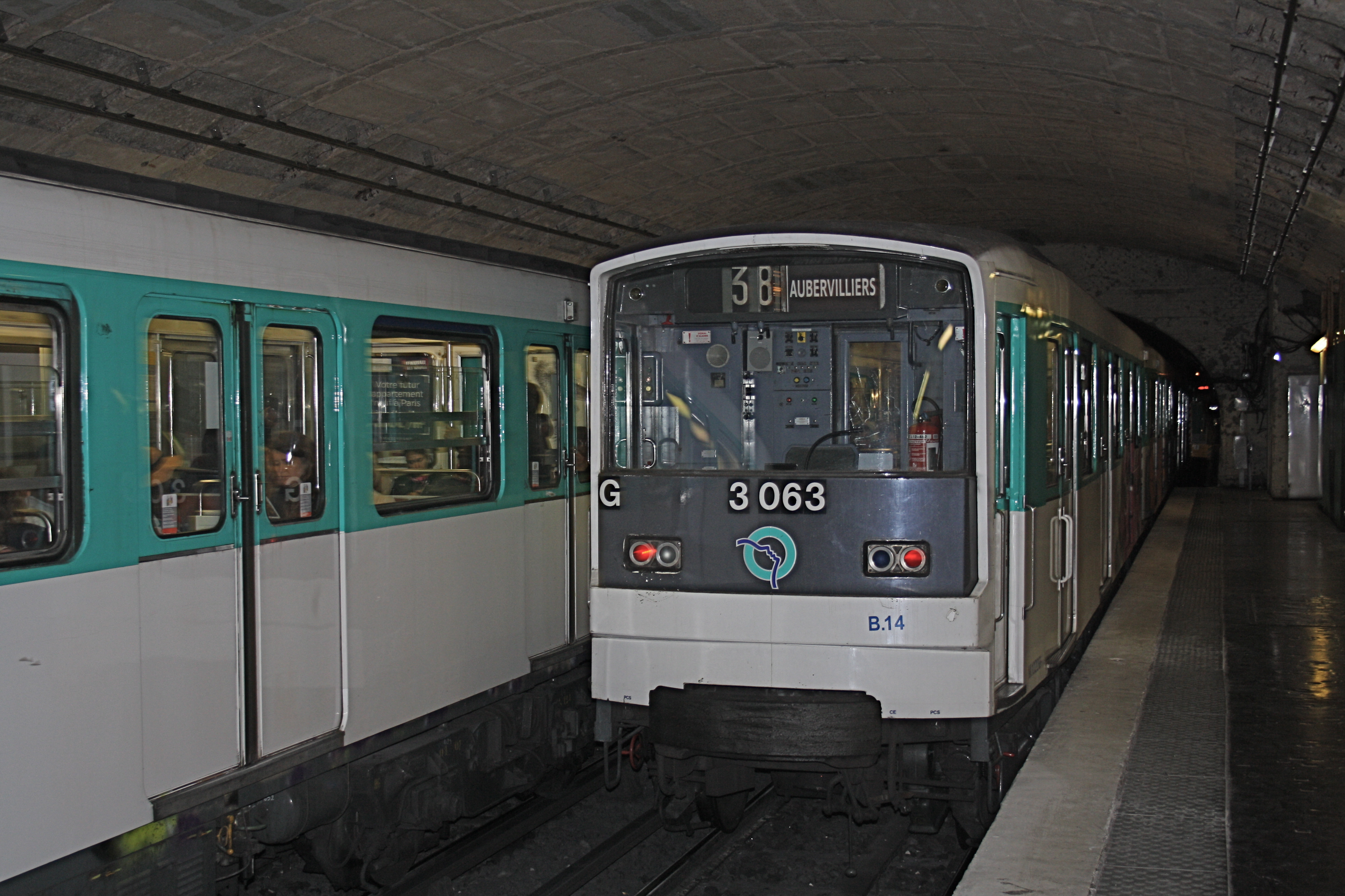 MF-67-Zug in der Pariser Métrostation Volontaires